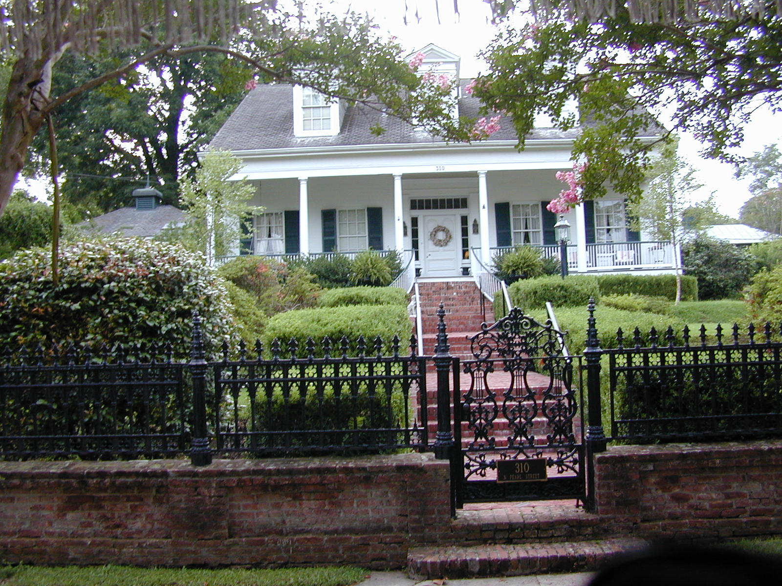 Antebellum house, Natchez Mississippi